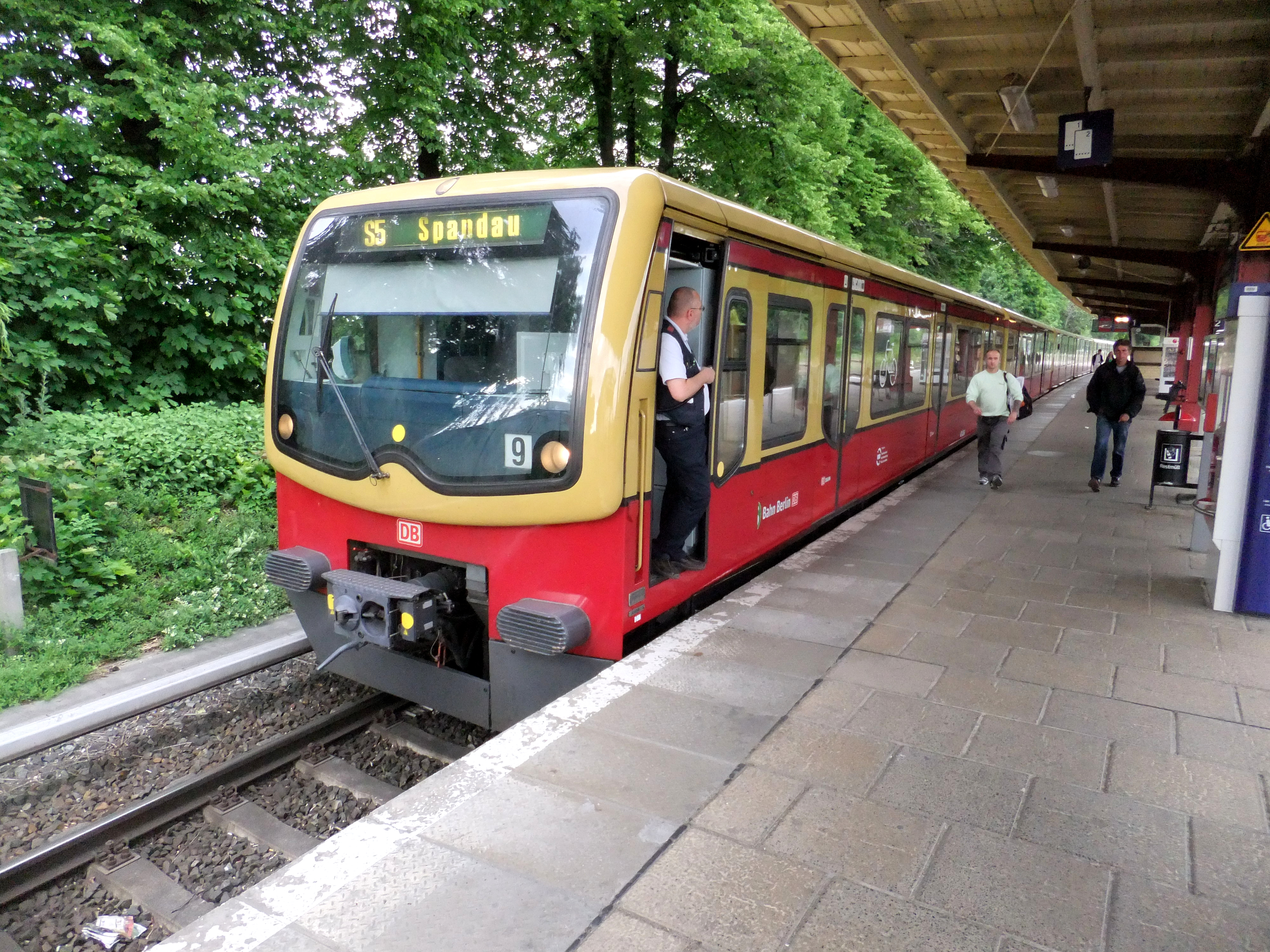 DBAG-Baureihe 481 der S-Bahn Berlin auf der Linie S5 im Bahnhof Berlin-Kaulsdorf